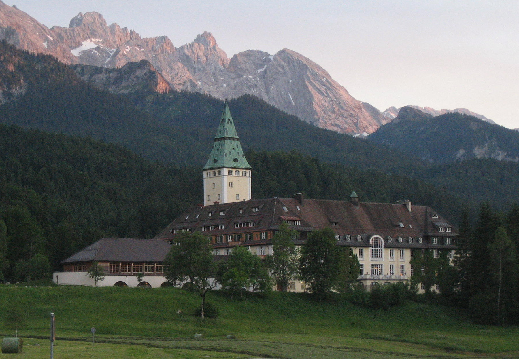 Schloss Elmau im Sommer 2005